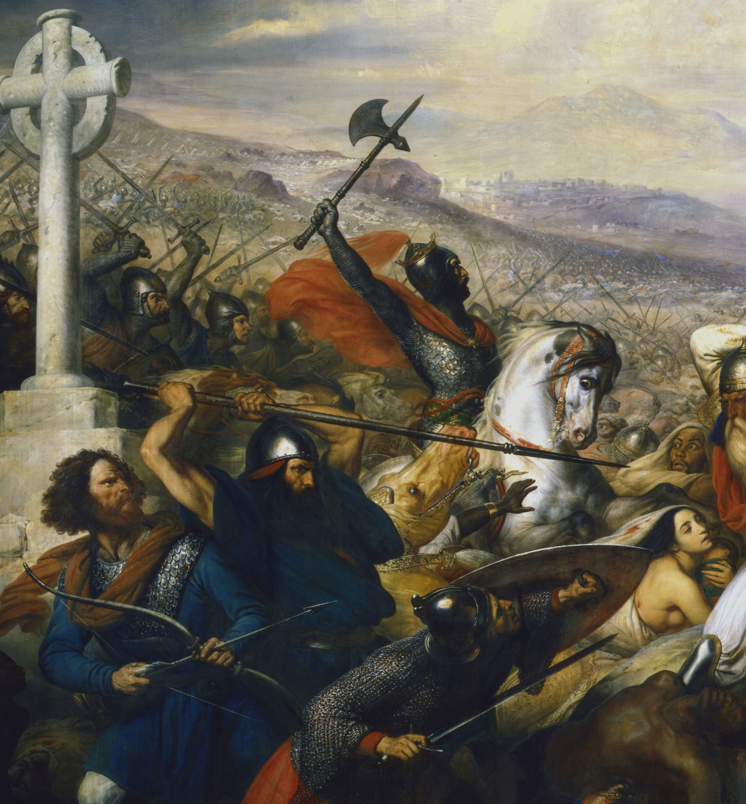 Detail from: Charles de Steuben, Bataille de Poitiers, en octobre 732